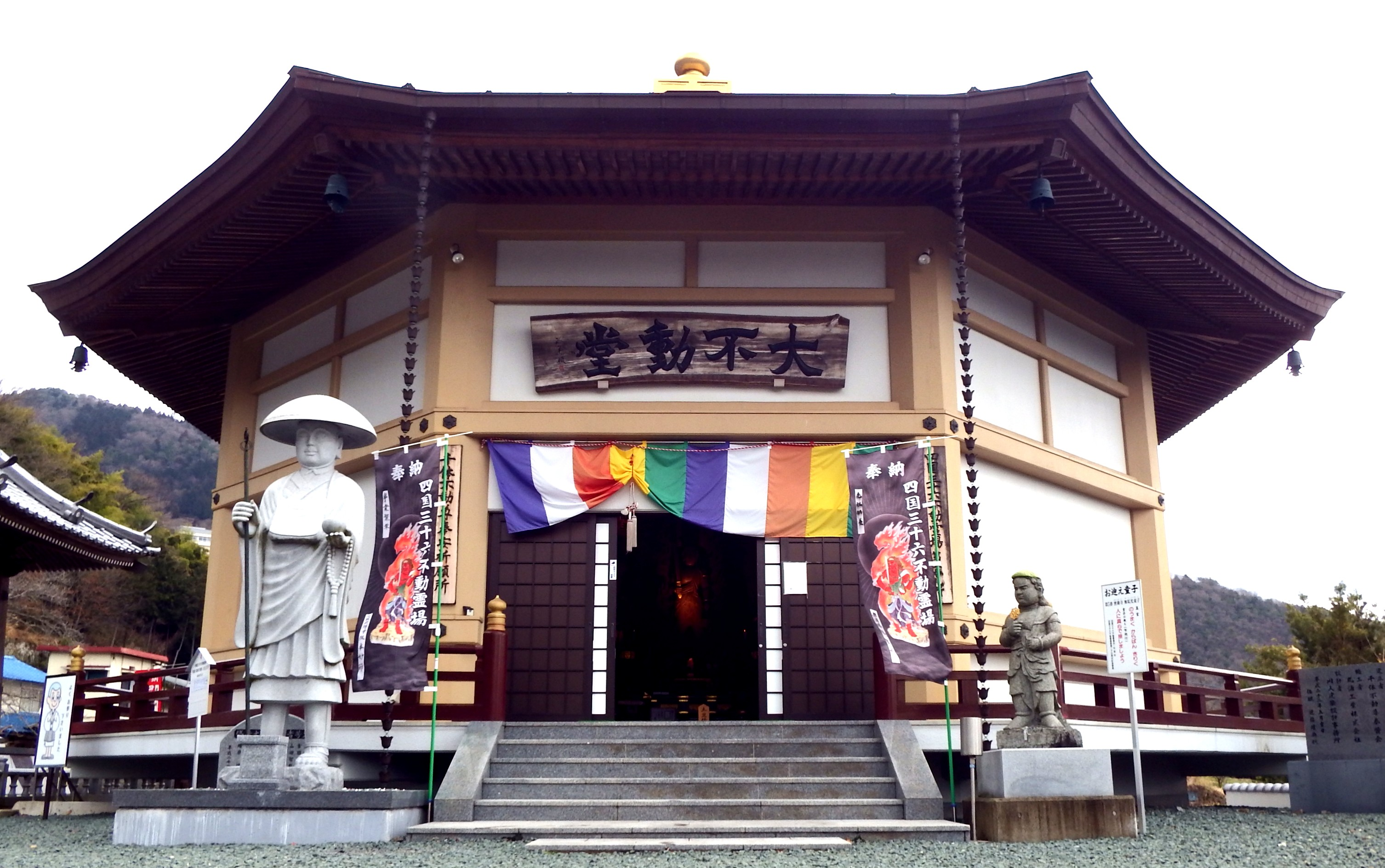 密厳寺（5番）八角不動堂